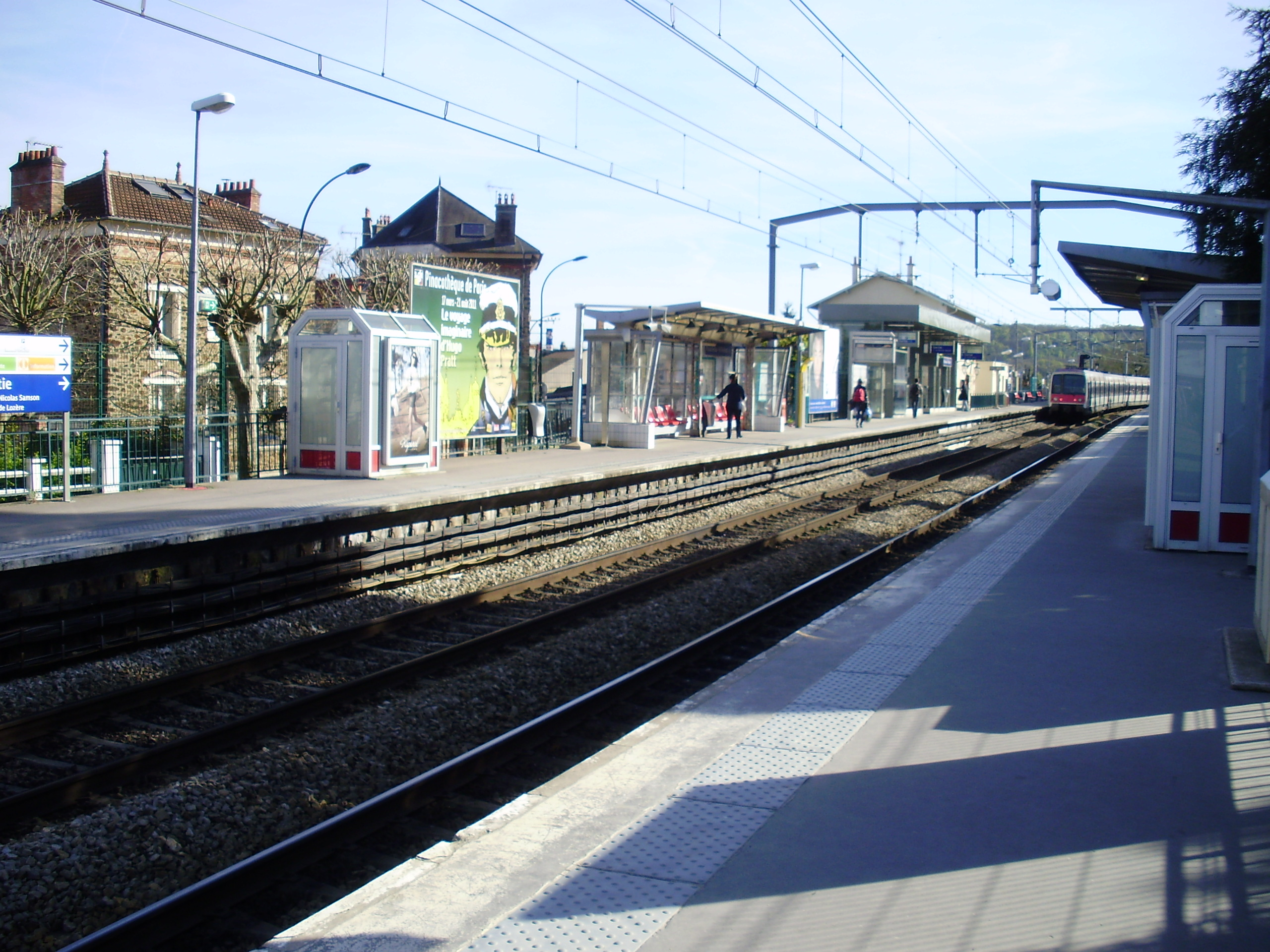 Gare de Palaiseau - Villebon, à Palaiseau, Essonne, France (vue en direction de Saint-Rémy-lès-Chevreuse)